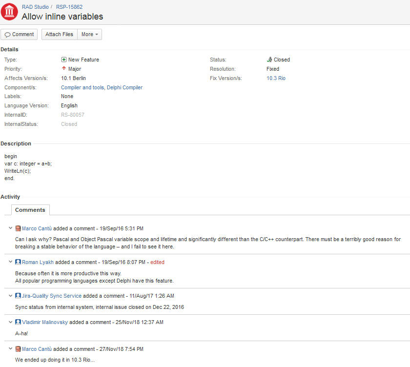 Предложение о введении "инлайновых" объявлений переменных